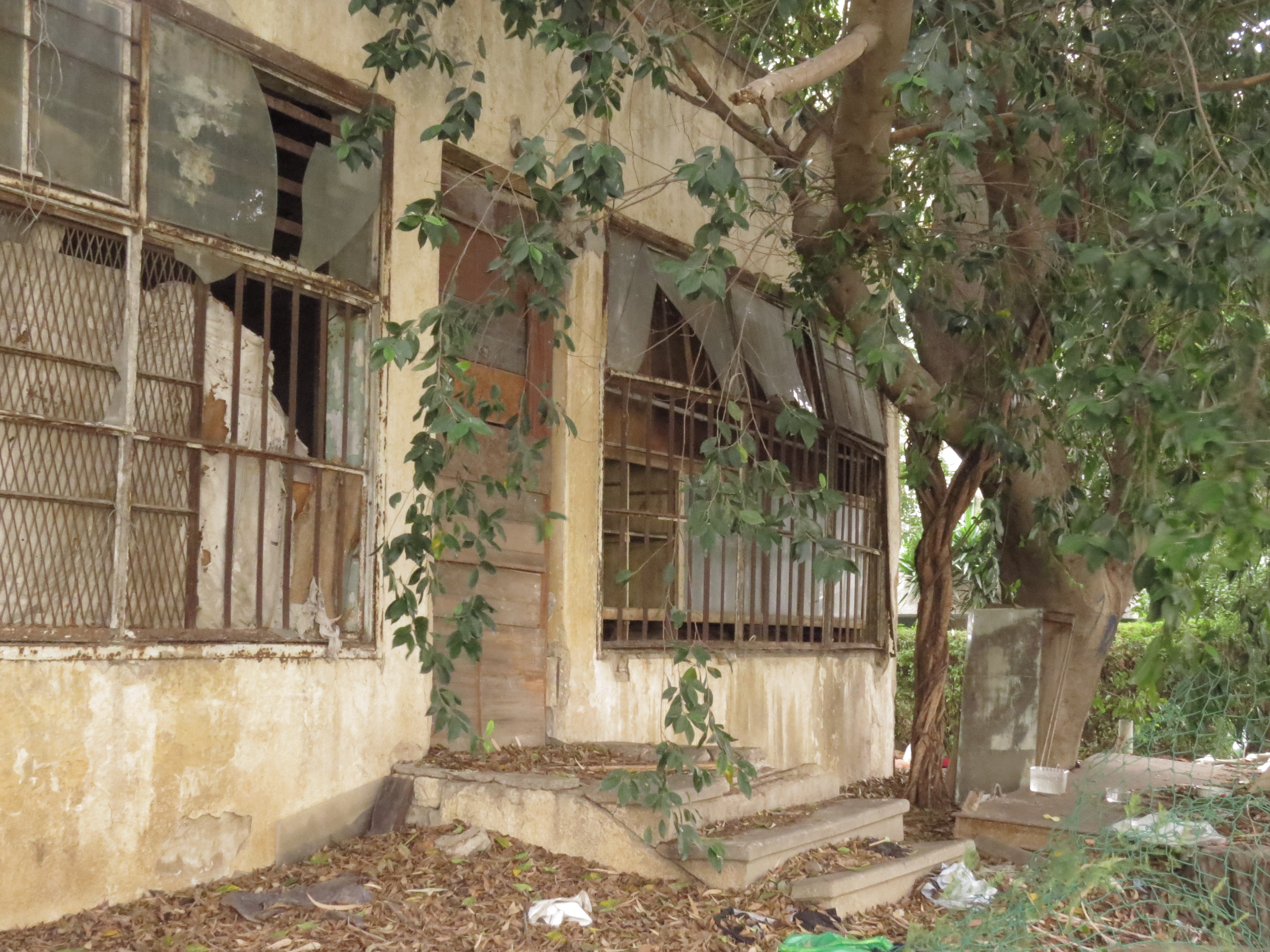 בית מרקחת ממלוק, הוקם ב-1944 על ידי הרוקח יצחק איזידור ממלוק. עיקר הטיפולים שלו היו בעשבי מרפא, ברפואה אלטרנטיבית ובהומיאופתיה. בחצר בית המרקחת גידל צמחי מרפא ובתוכם נענע, בבונג סרפדים ועוד. מעלי האקליפטוס שגדל בצר הכין חליטה לאינהלציה. בית המרקחת פעל במקום עד 1970.